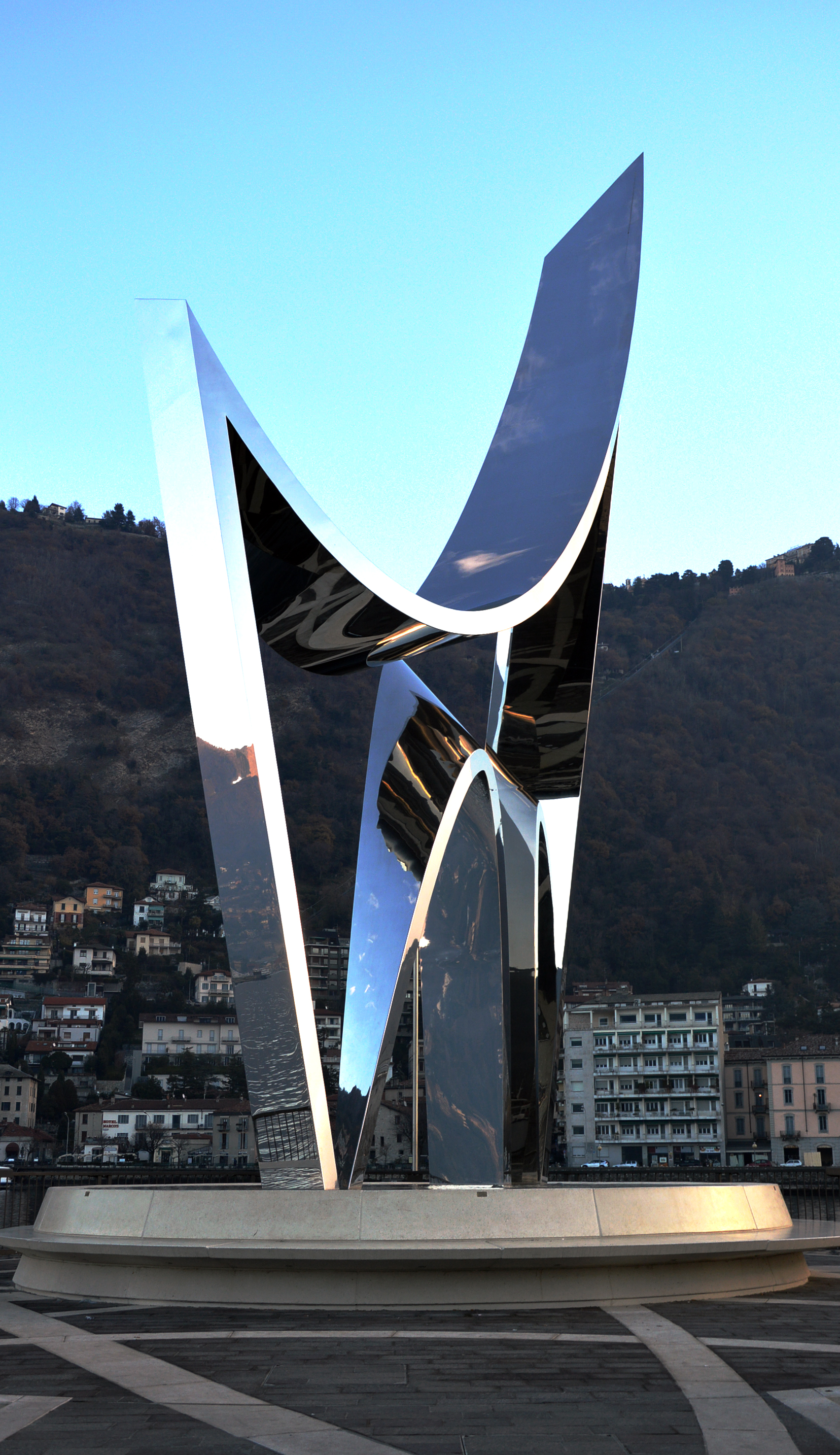 Life Electirc, opera di Daniel Libeskind in omaggio ad Alessando Volta (2015)